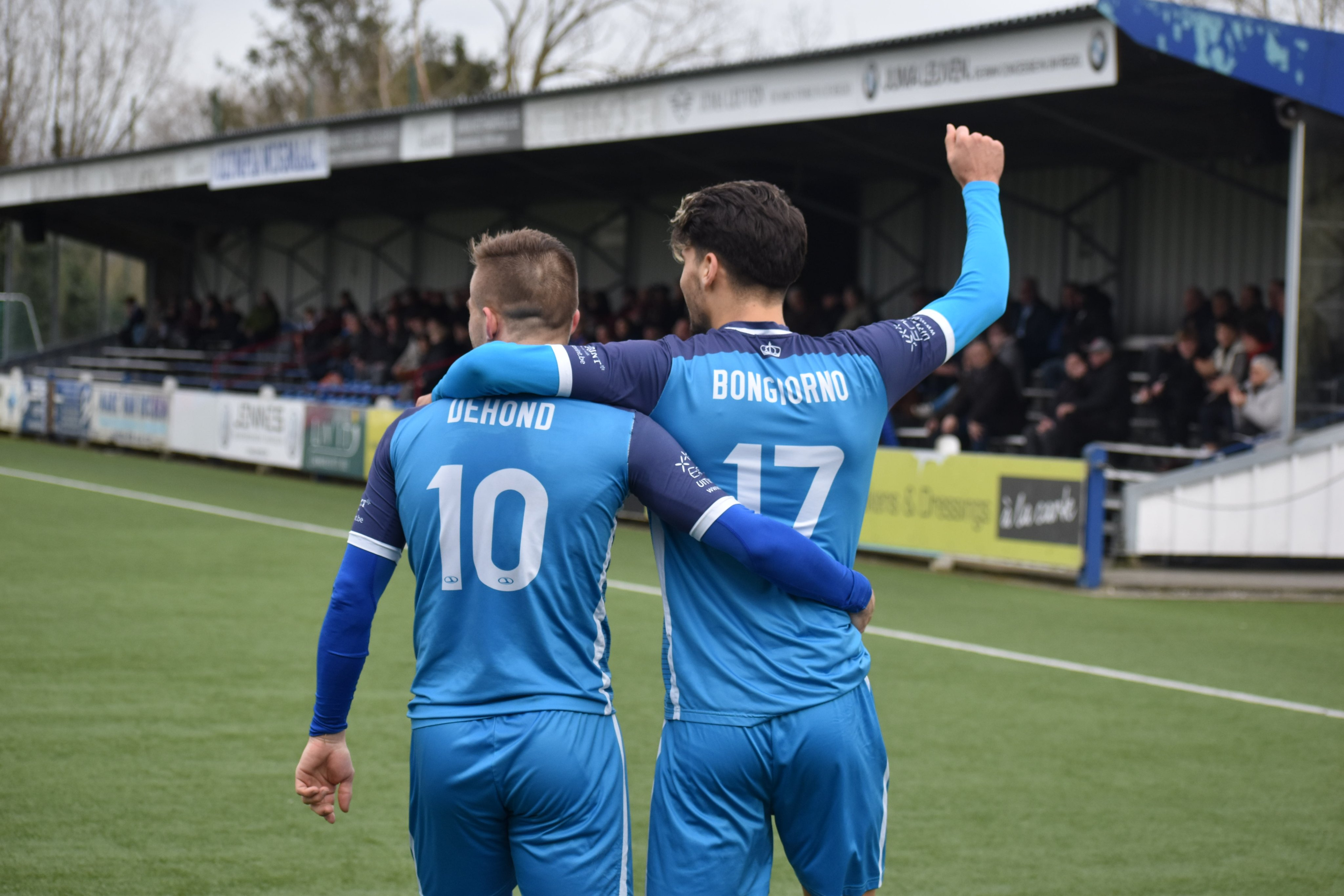 goal celebration